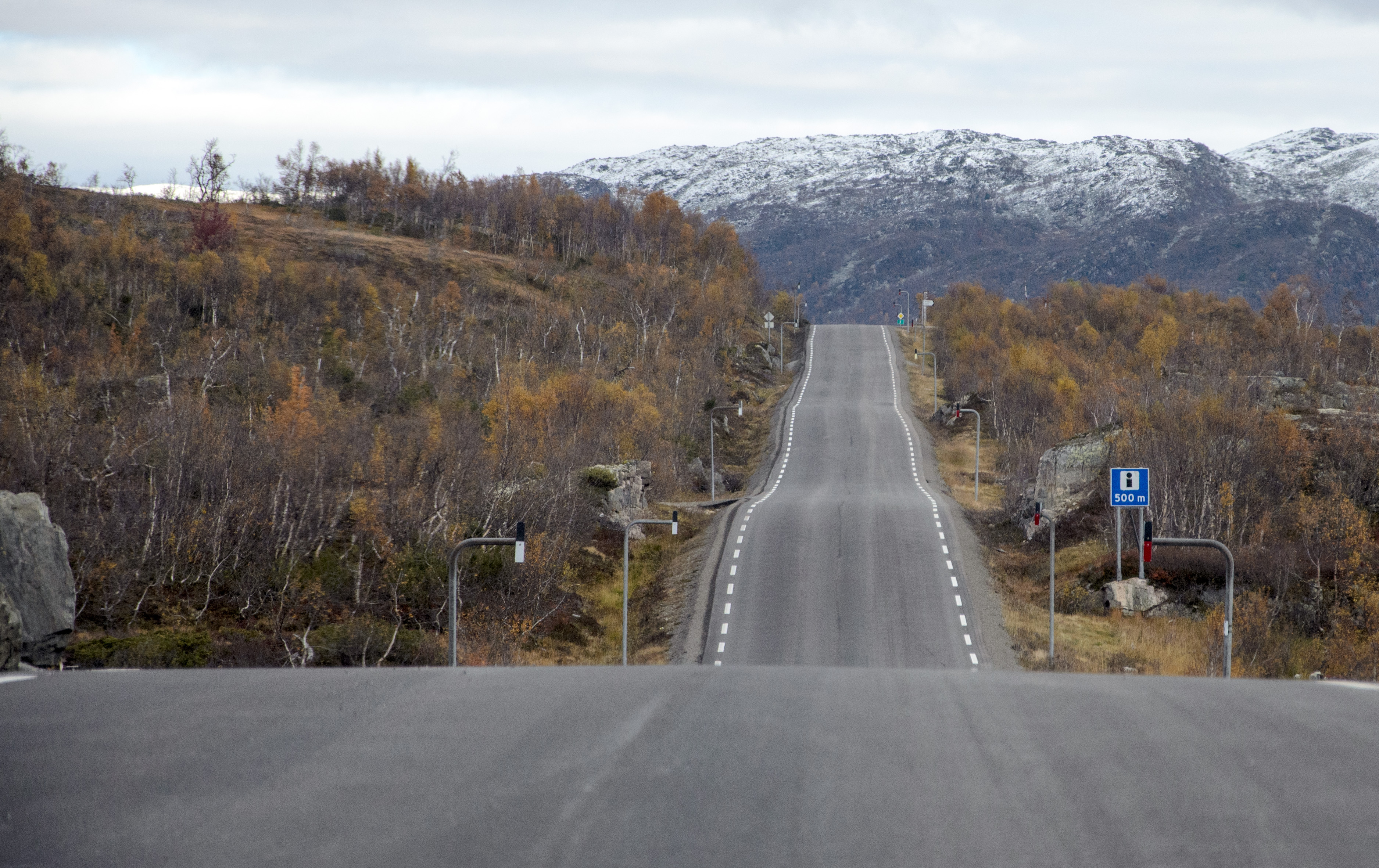 Riksvei 9 Bykleheivegen